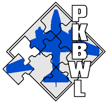 Państwowa Komisja Badania Wypadków Lotniczych – logo – Polska.